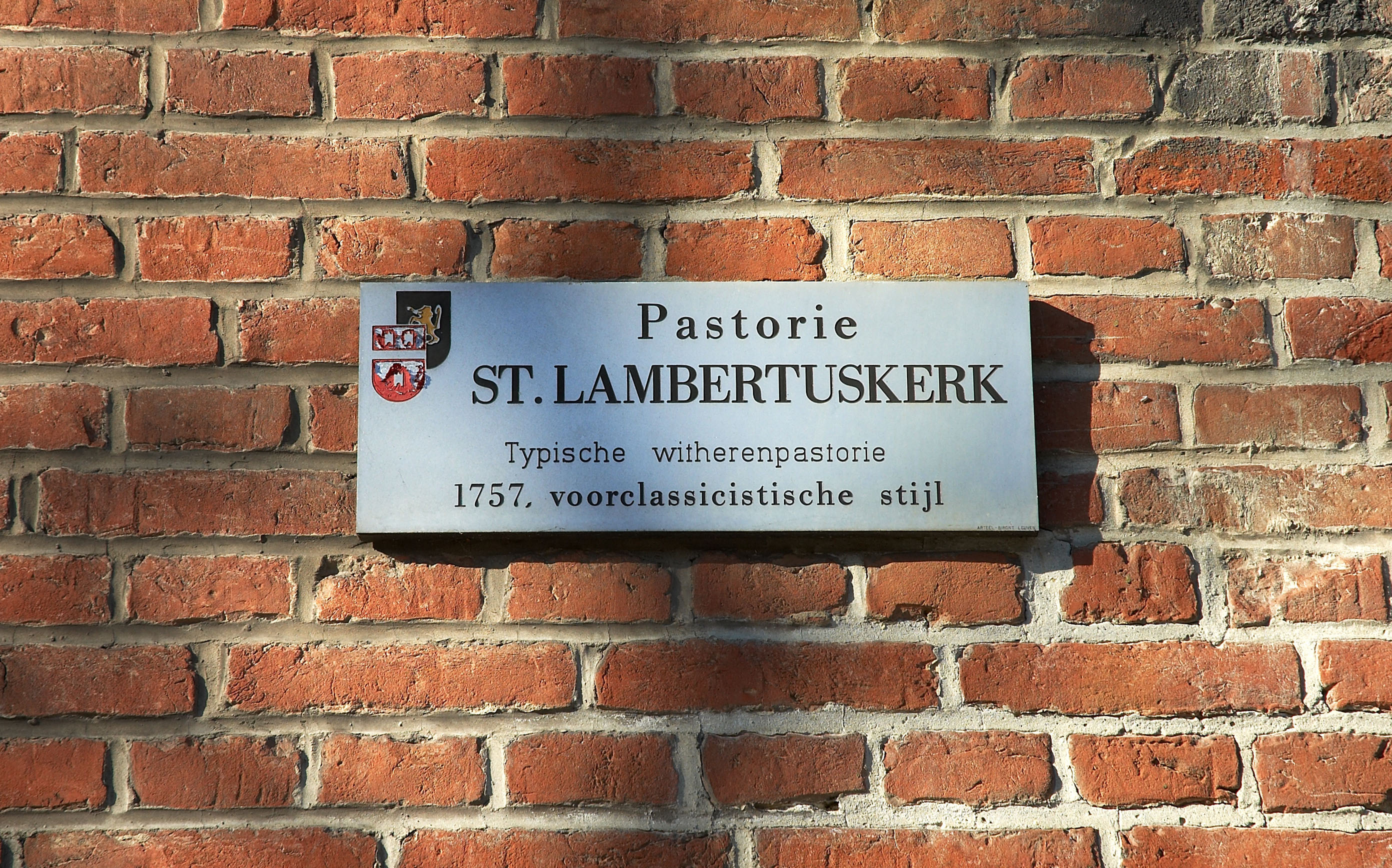 Bordje bij de pastorie bij de Sint-Lambertuskerk in Heverlee